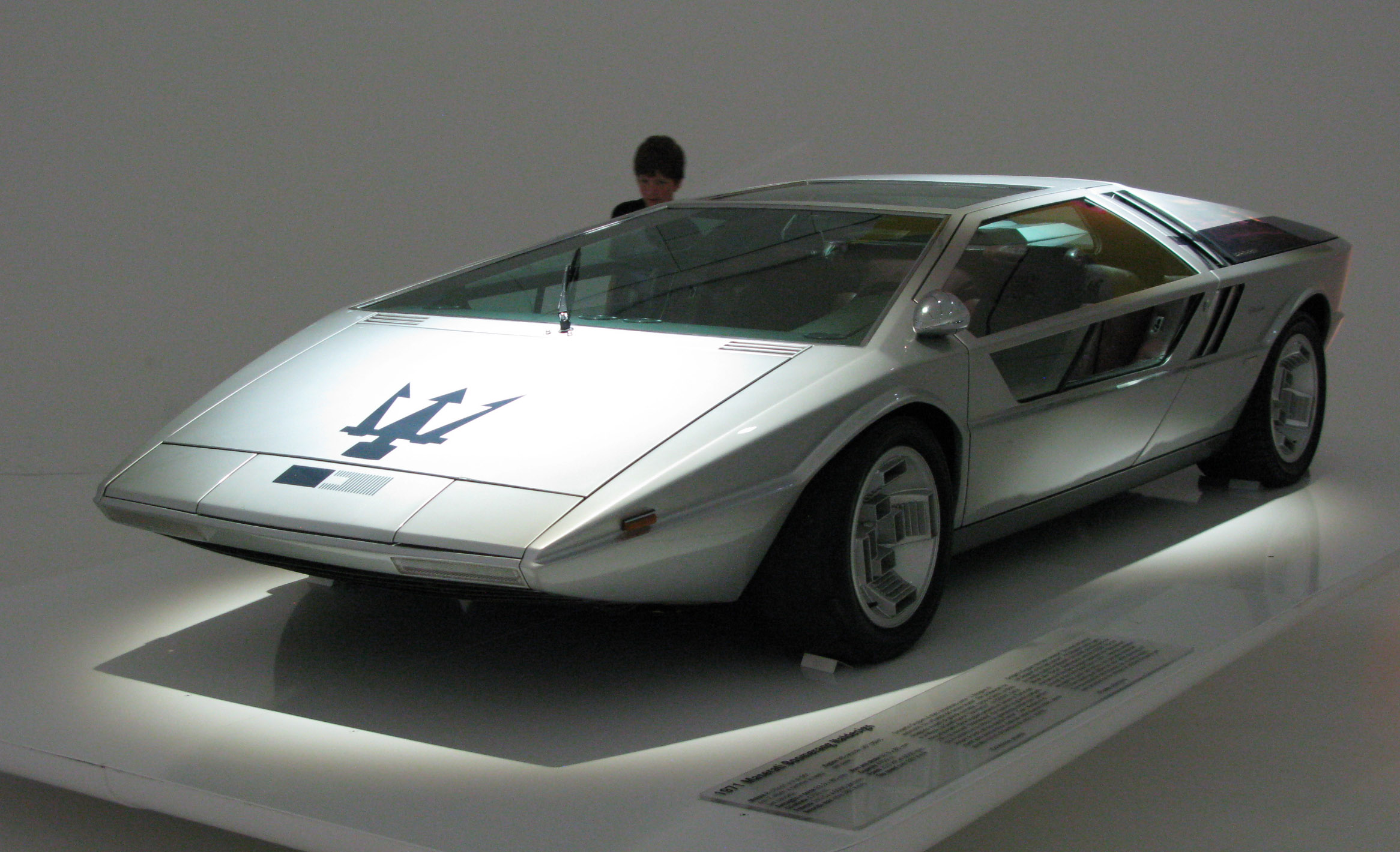 Maserati Boomerang